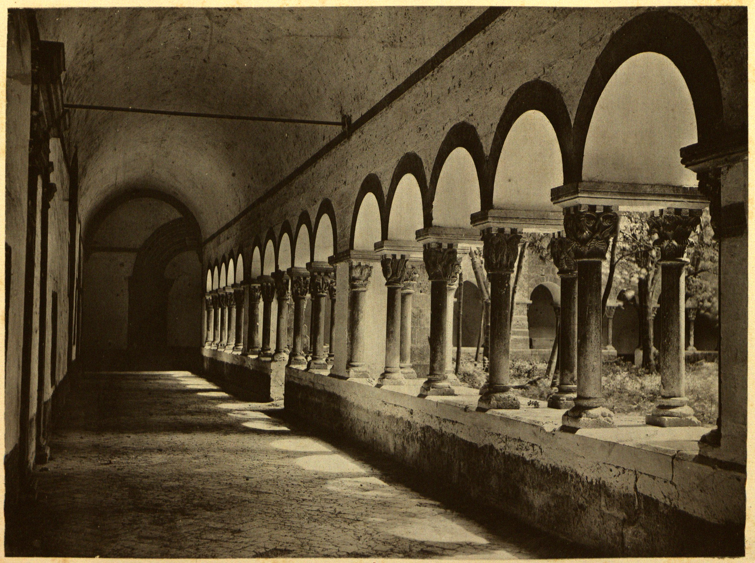 'Claustre del monestir de Sant Cugat del Vallès', fotografia d'Heribert Mariezcurrena (~1878). Estampa núm. 18, acompanyada de text explicatiu, a l'Album Pintoresch-Monumental de Catalunya: aplech de vistas dels més notables monuments i paisatjes d'aquesta terra acompanyadas de descripcions y noticias históricas y de guias pera que sían fácilment visitats, publicat per l'Associació Catalanista d'Excursions Científiques el 1878. De disposició lliure al dipòsit digital de documents de la UAB.